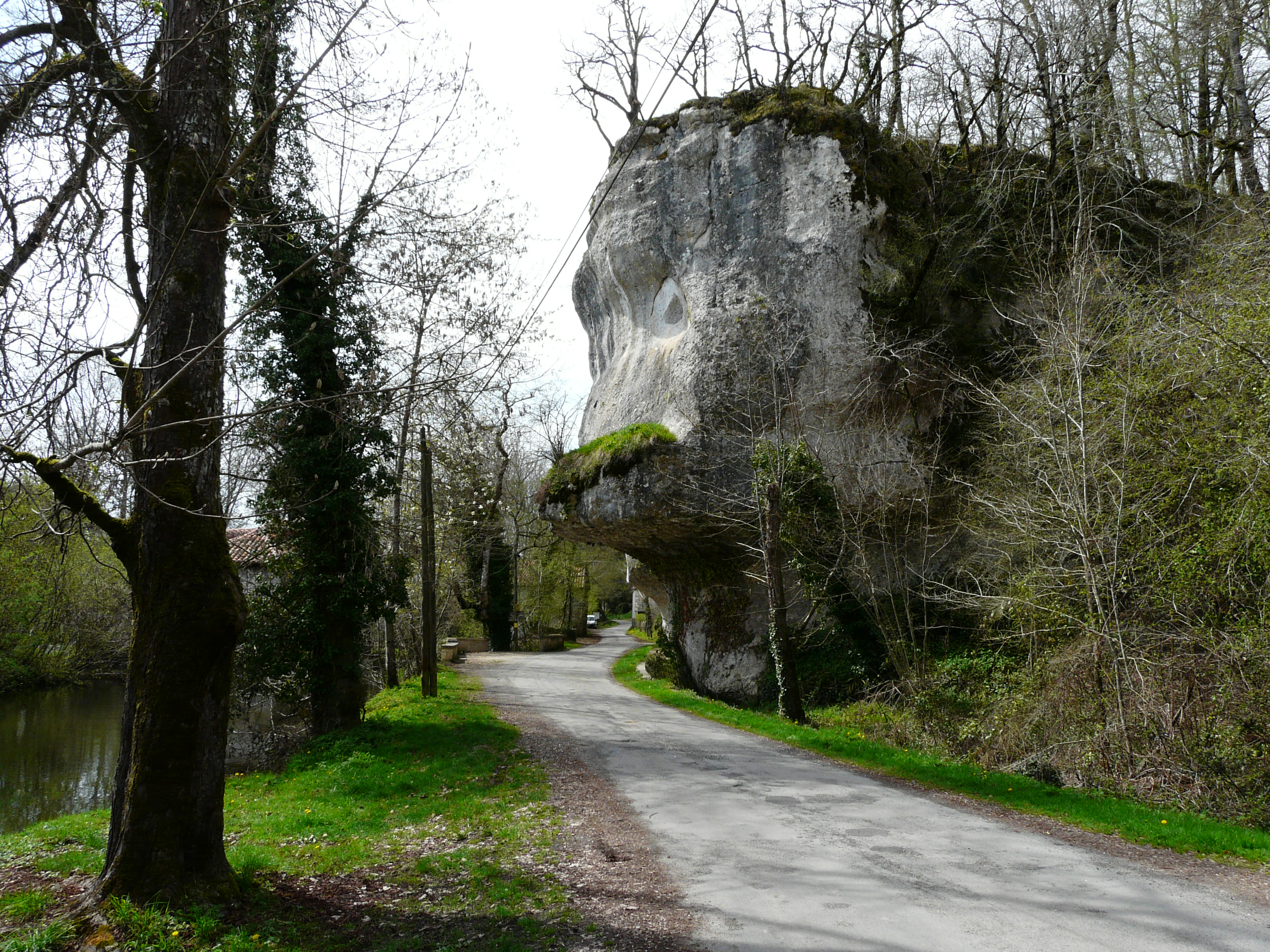 Les rochers de Rochereil, ou Rochereuil, au bord de la Dronne, Grand-Brassac, Dordogne, France.